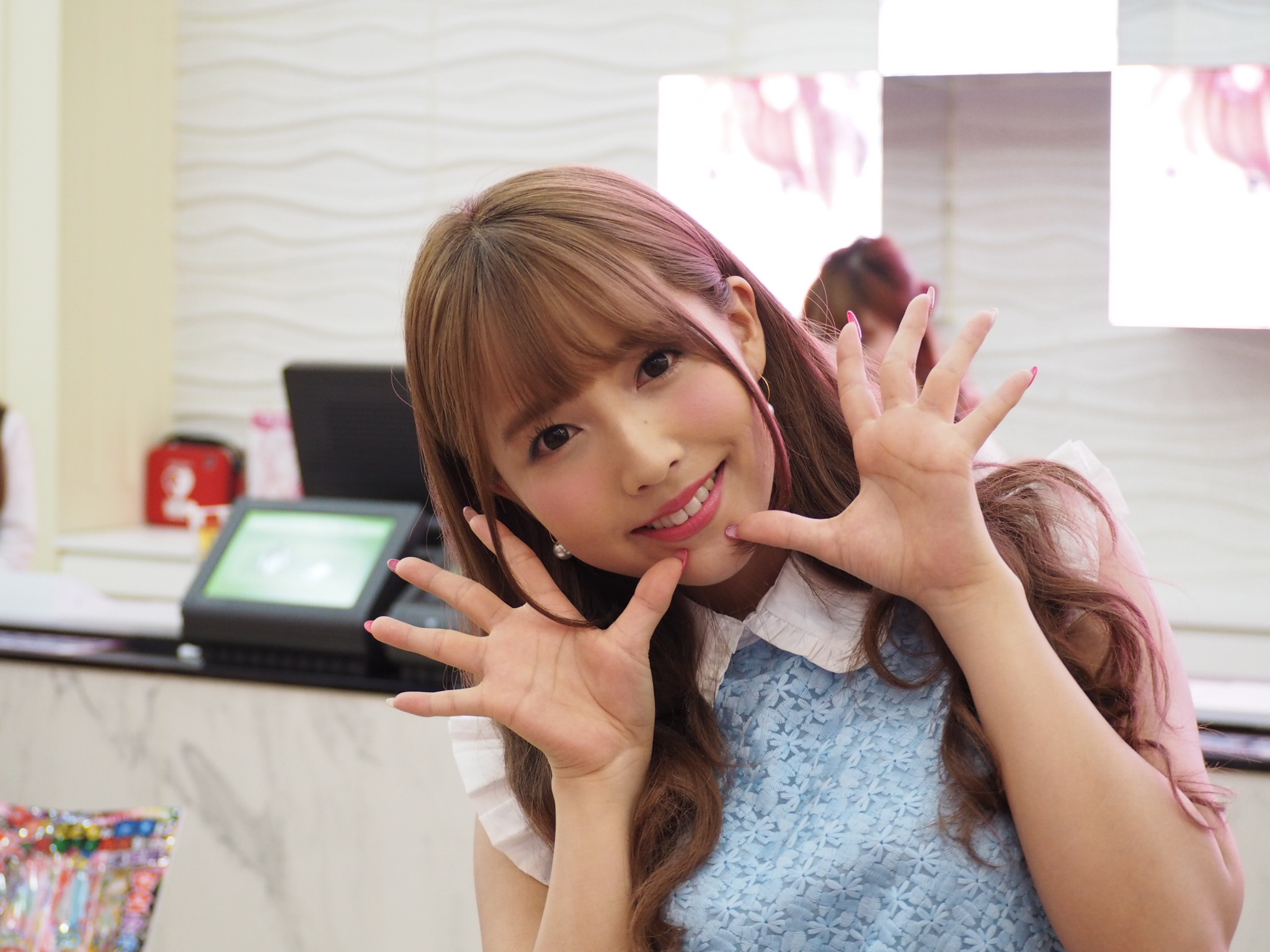 三上悠亜 パチンコイベントにて撮影